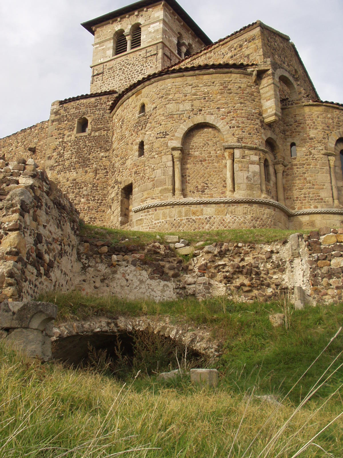 L'église prieurale de Saint-Romain-le-Puy